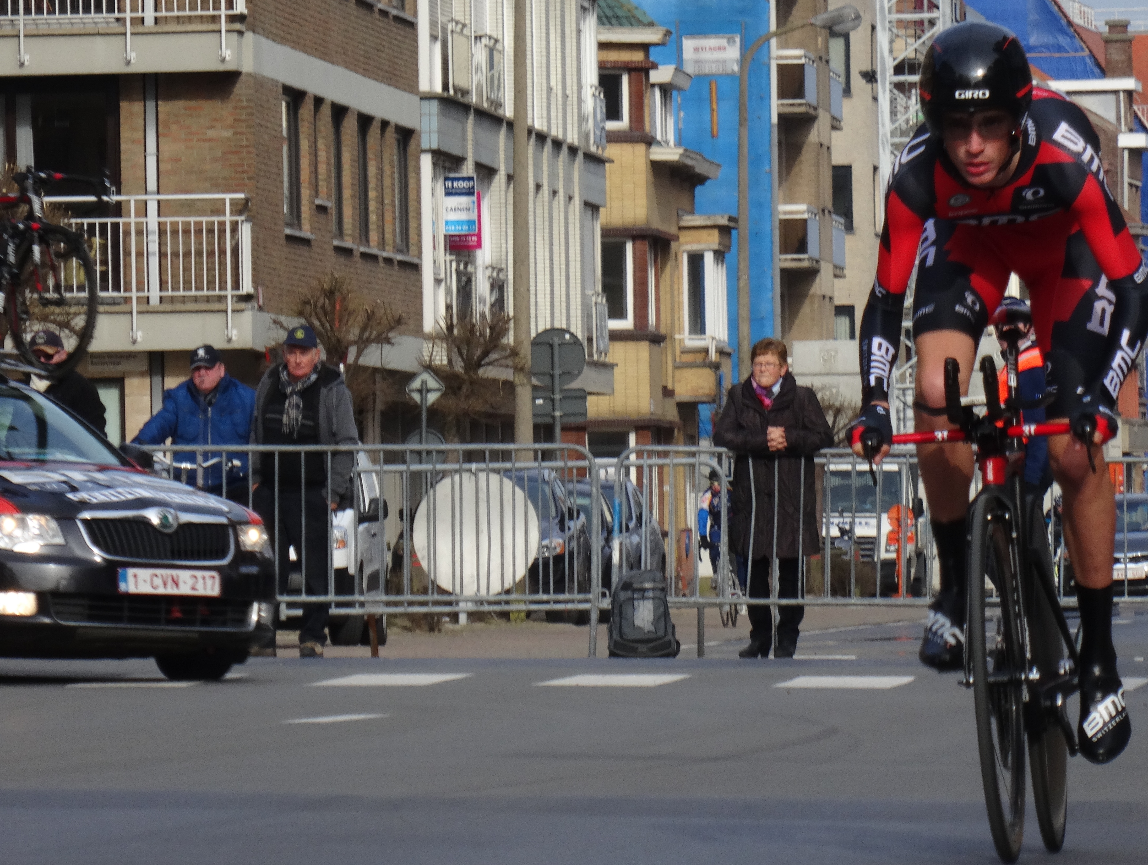 Prologue de Driedaagse van West-Vlaanderen 2015... Depicted person: Manuel Senni Depicted team: BMC Racing